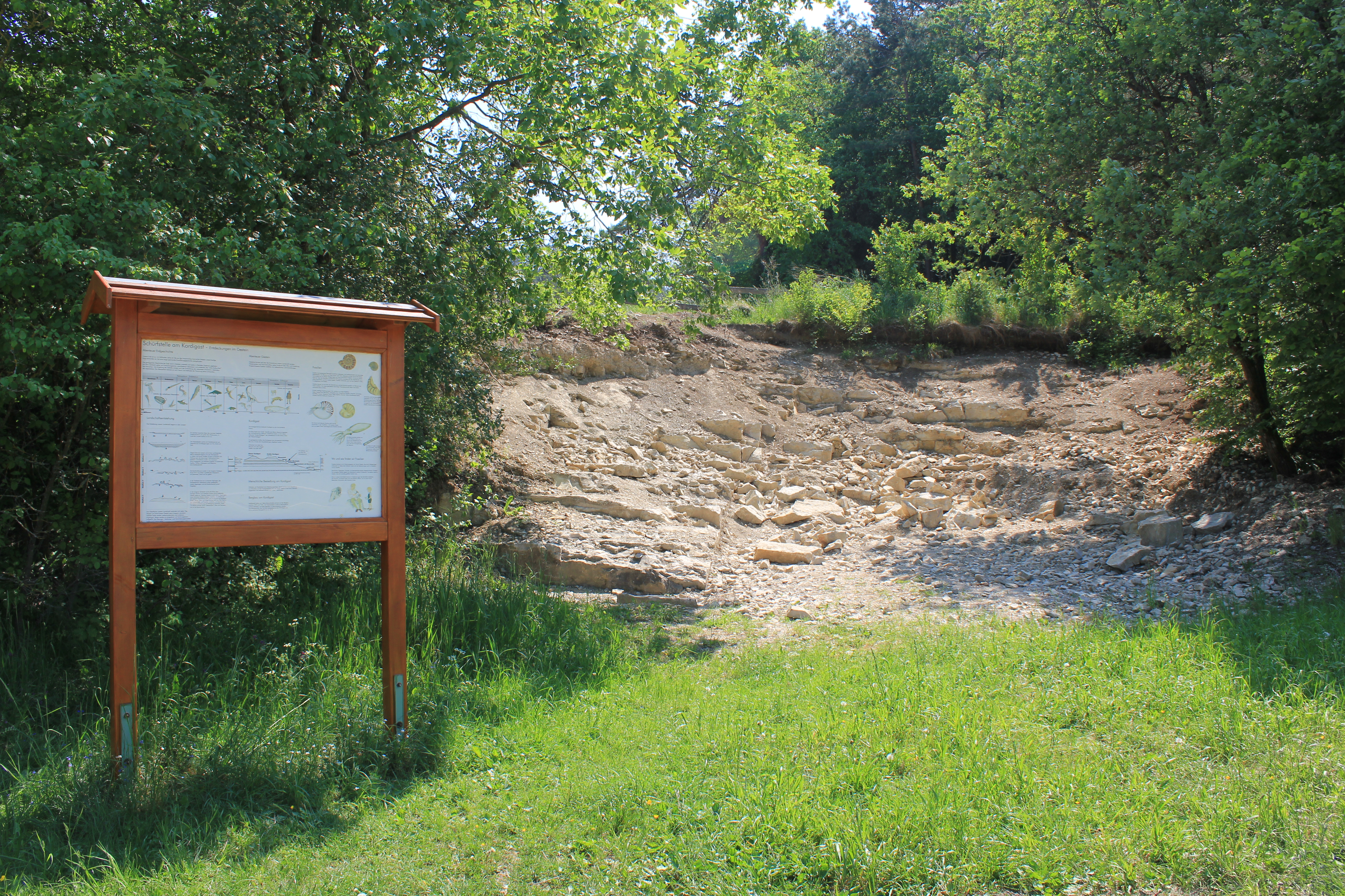 Die Fossilien-Schürfstelle am Wanderparkplatz auf dem Kordigast.